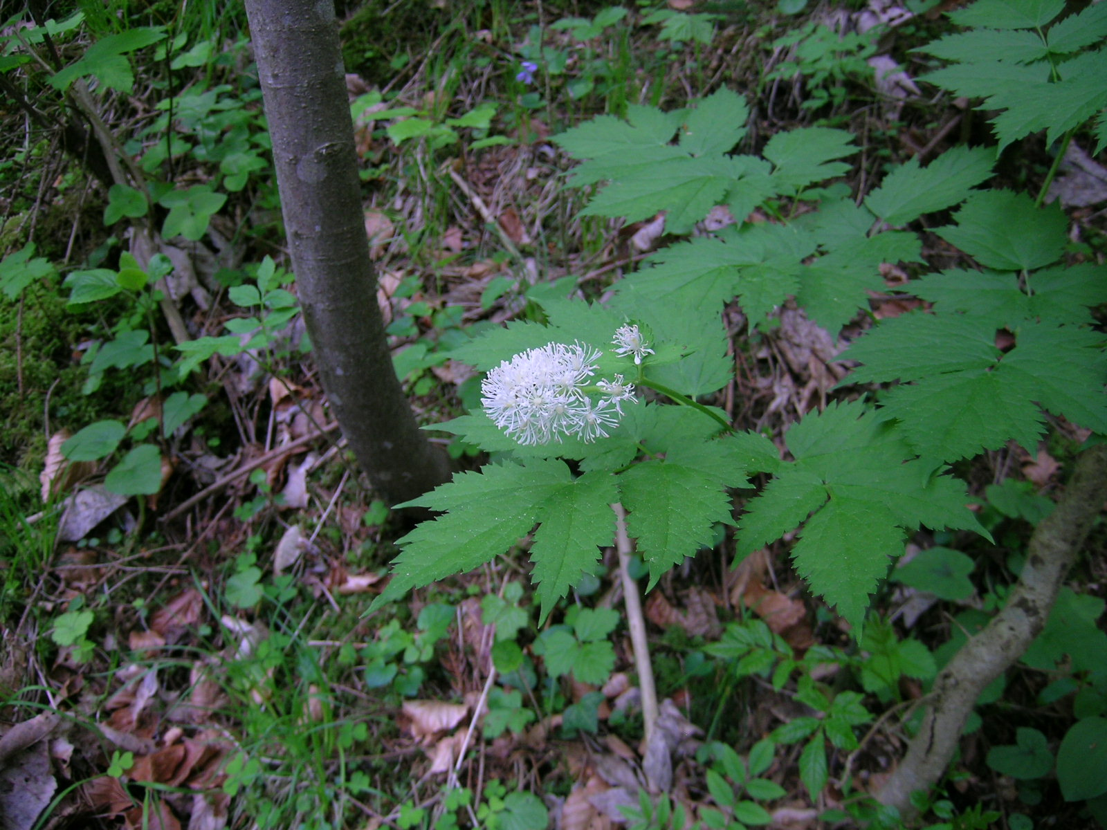 Actaea spicata, Sigriswil (1100 m.a.s), Kanton Bern, Schweiz